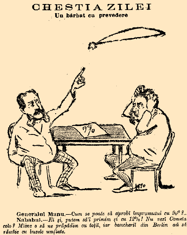 Caricatură apărută în ziarul Adevărul, 12, nr. 3691, 1 noiembrie 1899 satirizând condiţiile extrem de nefavorabile în care guvernul conservator a realizat împrumutul extern